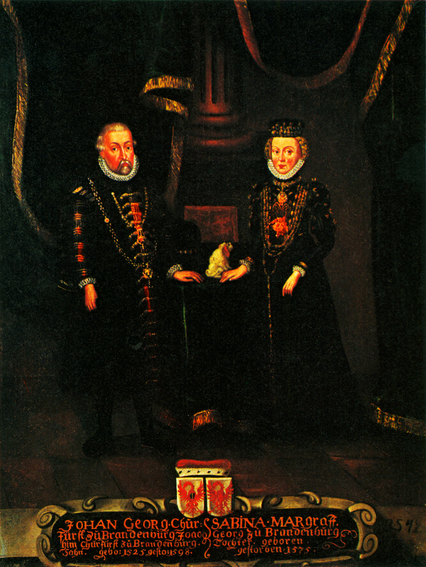 Johann Georg, Kurfürst von Brandenburg (1525-1598) und seine zweite Gemahlin Sabina, Markgräfin von Bayreuth (1529-1575). Sammlung Gripsholm.